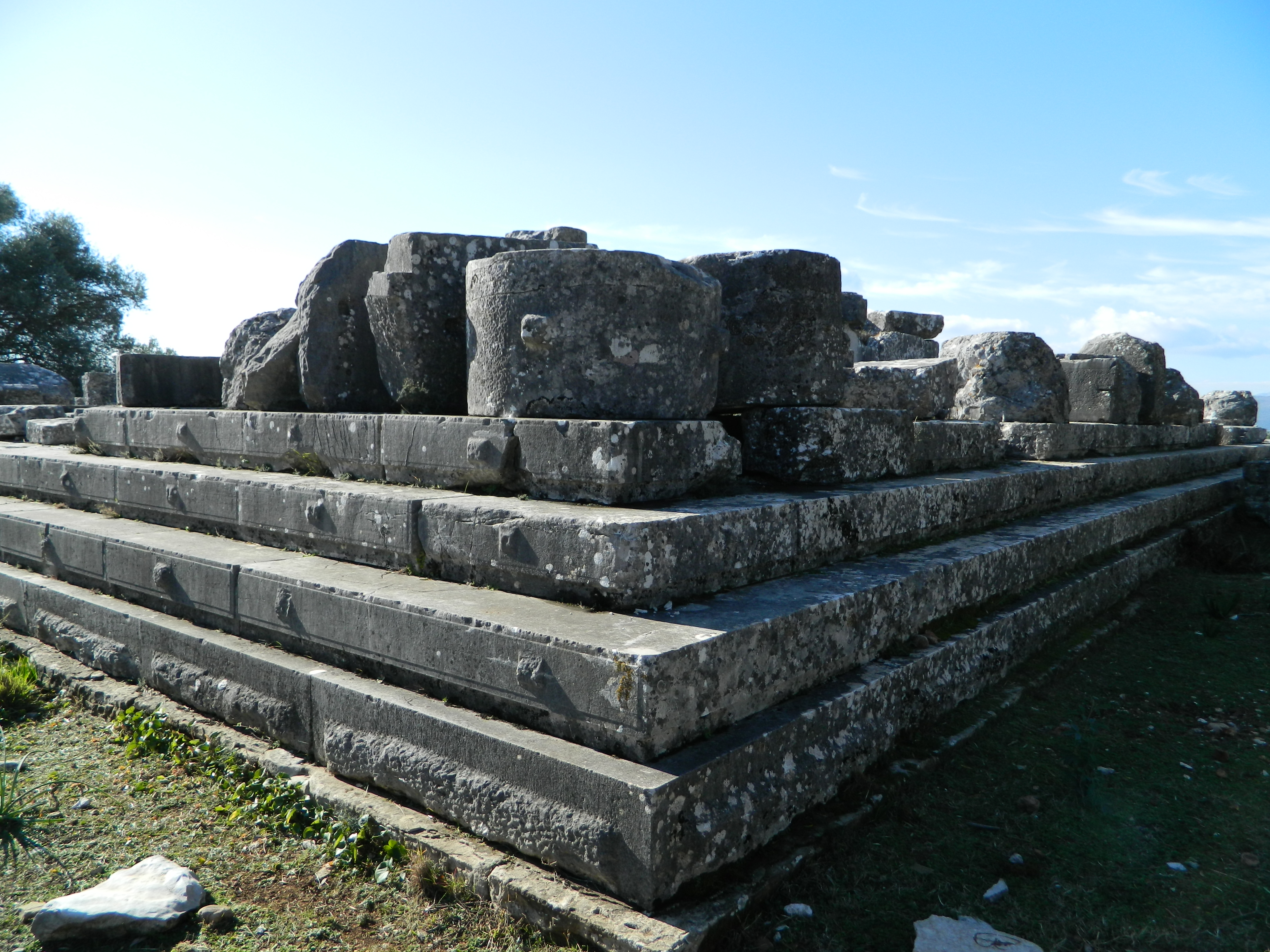 Ναός Στρατίου Διός«Ναός Στρατίου Διός»